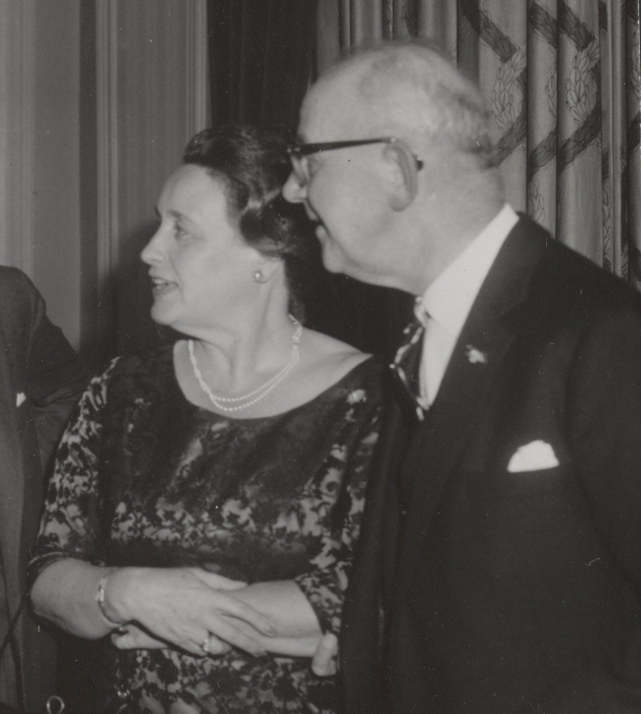 Collectie / Archief : Fotocollectie Elsevier Reportage / Serie : [ onbekend ] Beschrijving : jubilea, verenigingen, burgemeesters, Hall, Gijs van, Jacob Des Bouvrie Mw., Kolfschoten H.A.m.T., Nederlands Genootschap van Burgemeesters Datum : 14 oktober 1965 Locatie : Scheveningen, Zuid-Holland Trefwoorden : burgemeesters, jubilea, verenigingen Persoonsnaam : Hall, Gijs van, Jacob Des Bouvrie Mw., Kolfschoten H.A.m.T., Nederlands Genootschap van Burgemeesters Fotograaf : Bilsen, Joop van / Anefo Auteursrechthebbende : Nationaal Archief Materiaalsoort : Foto (zwart/wit) Nummer archiefinventaris : bekijk toegang 2.24.05.02 Bestanddeelnummer : 083-0145